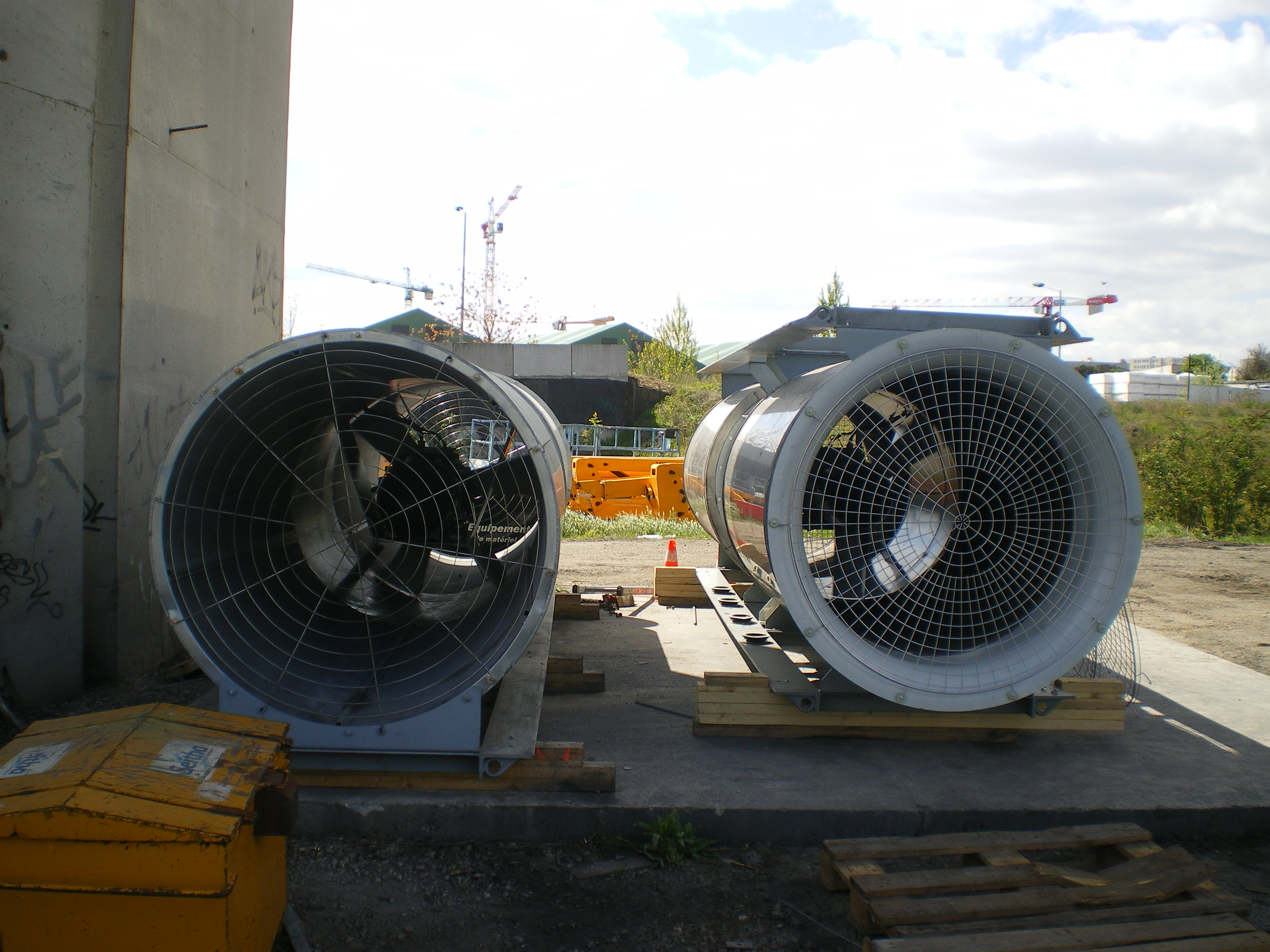 Des ventilateur en attent de pose dans le tunnel de Nanterre - la Défense entreposés au pied du viaduc de Nanterre